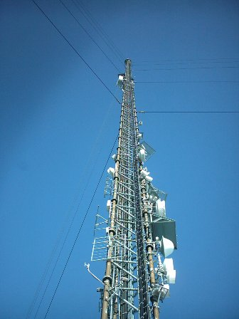 Storbergsmasten heißt ein 335 Meter hoher Sendemast für Radio- und Fernsehübertragung in der mittel-schwedischen Gemeinde Hudiksvall